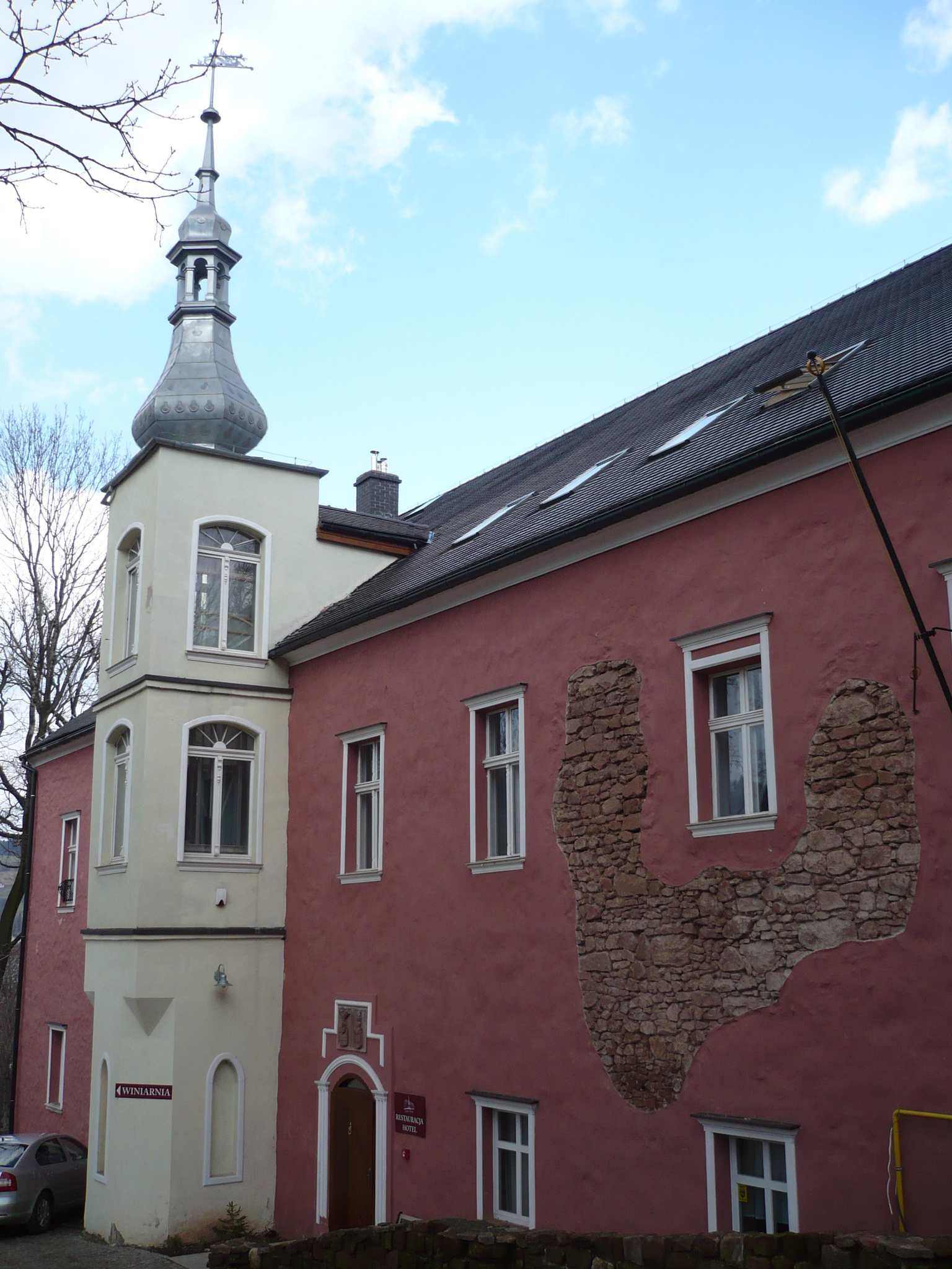 Nowa Ruda, ul. Kościelna 30 - Dwór Górny, obecnie hotel, XVII, XIX w. (zabytek nr A/940/652/WŁ z 25.05.1977)